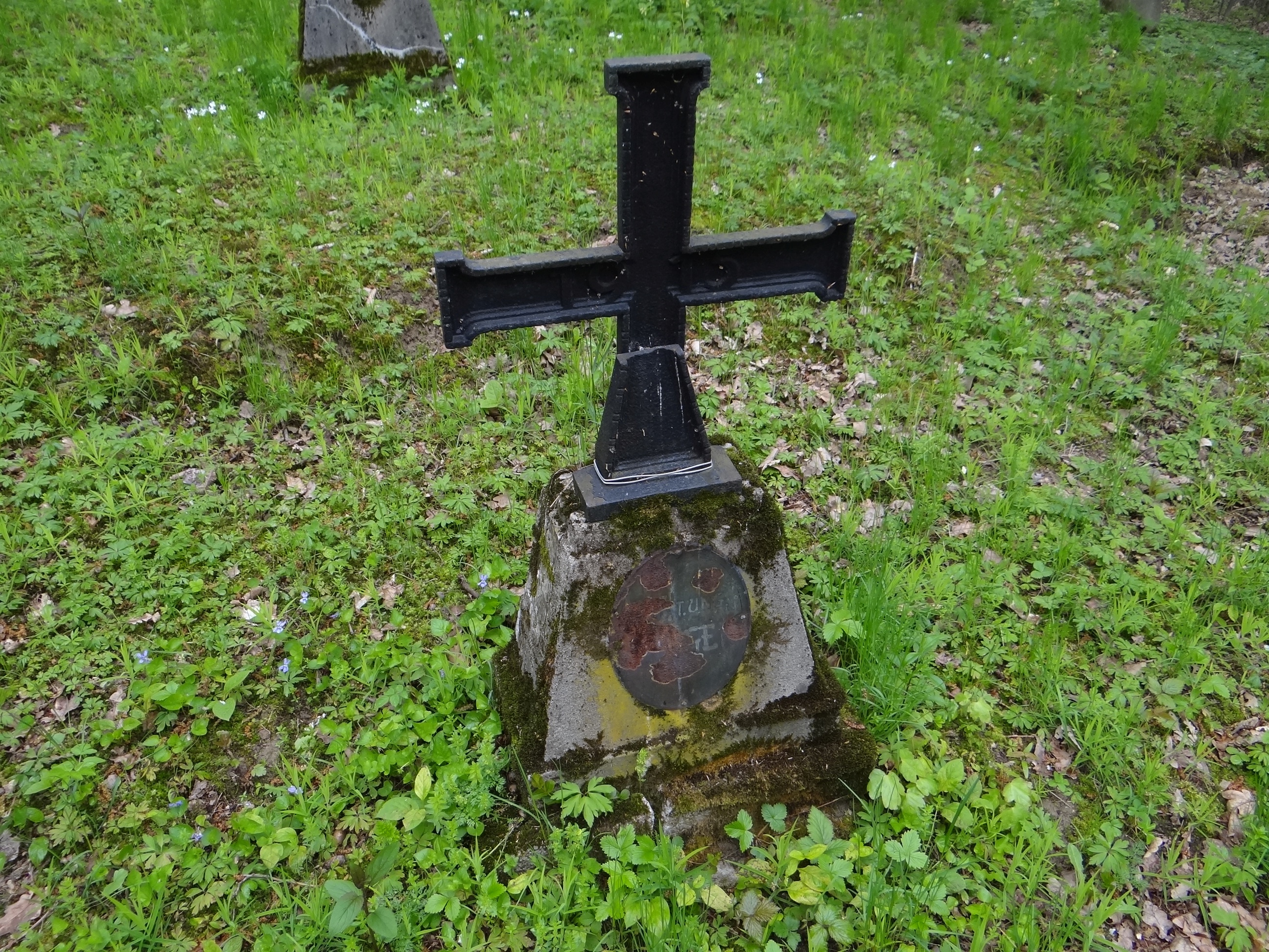 Cmentarz wojenny nr 148 – Chojnik